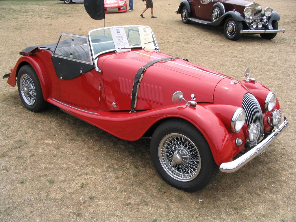 Morgan Plus4 Baujahr 1963, fotografiert von Ramgeis in Pebble Beach, Kalifornien im August 2004, GNU-FDL first upload in de wikipedia on 05:35, 17. Okt 2004 by Ramgeis